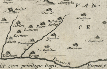 Carte d'Avignon et du Comtat Venaissin 1620 Dessinateur : Jean Picquet, éditeur : Jean Leclerc